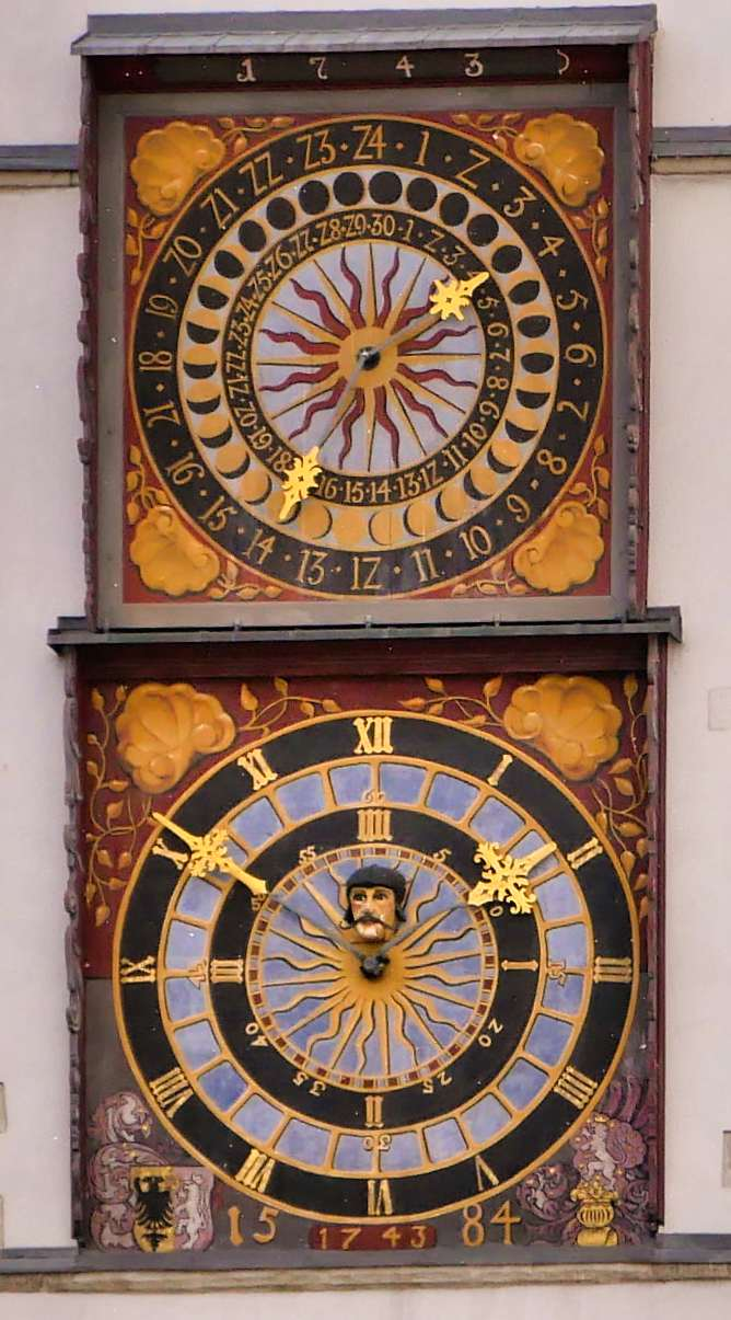 Rathaus-Uhren am Rathaus Görlitz